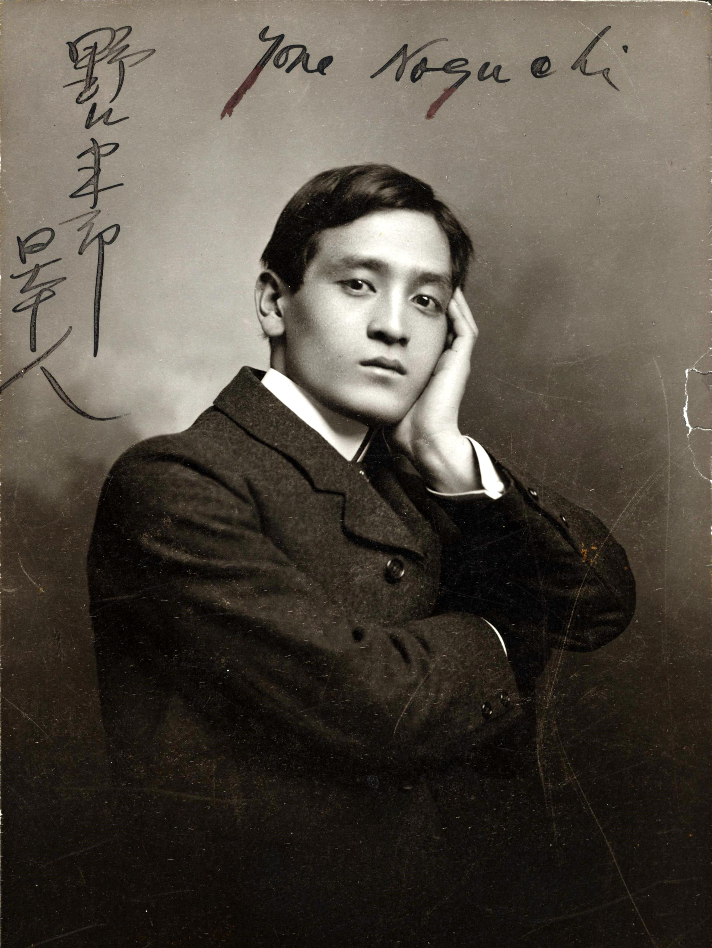 野口米次郎肖像。Yone Noguchi